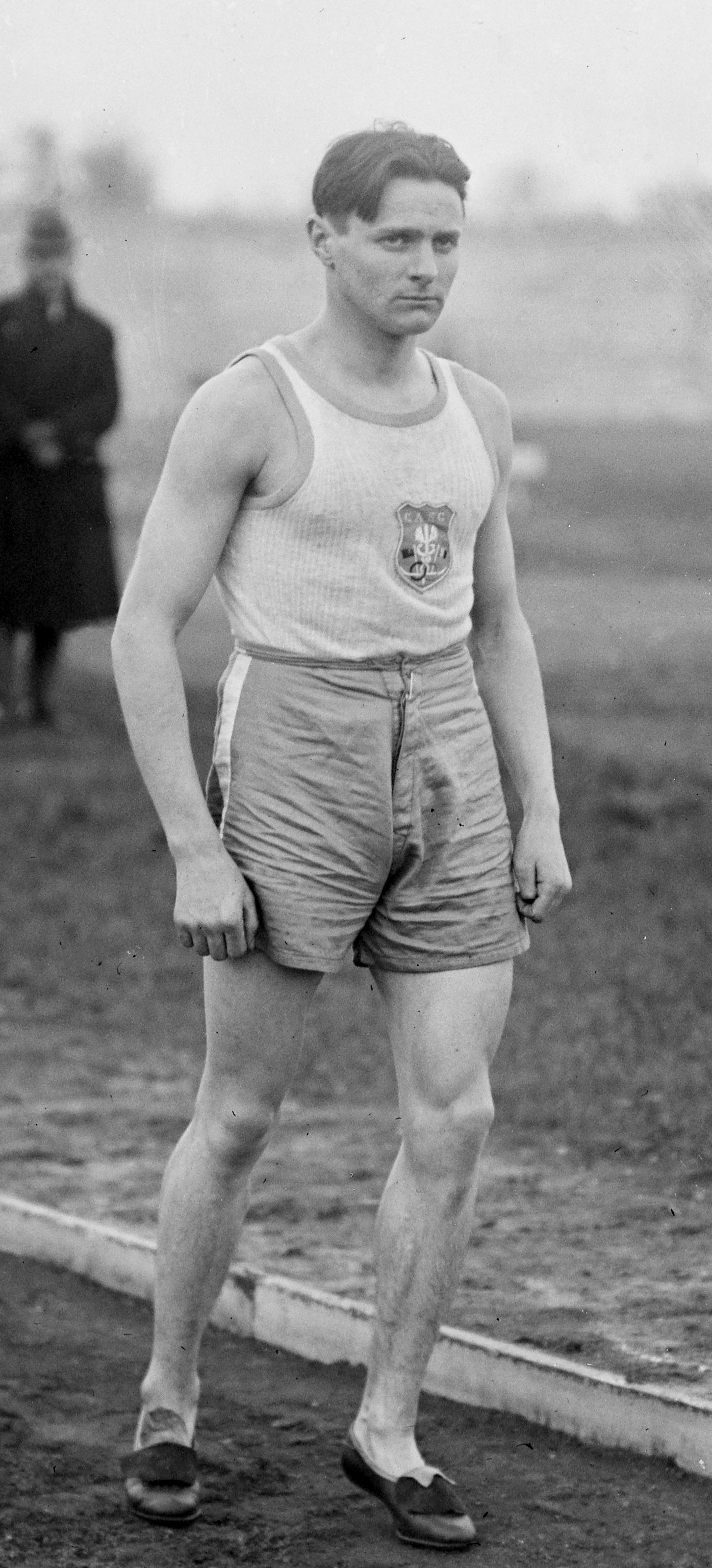 7/11/20, stade Pershing, Joseph Guillemot au départ de sa tentative de record du 3000 m.